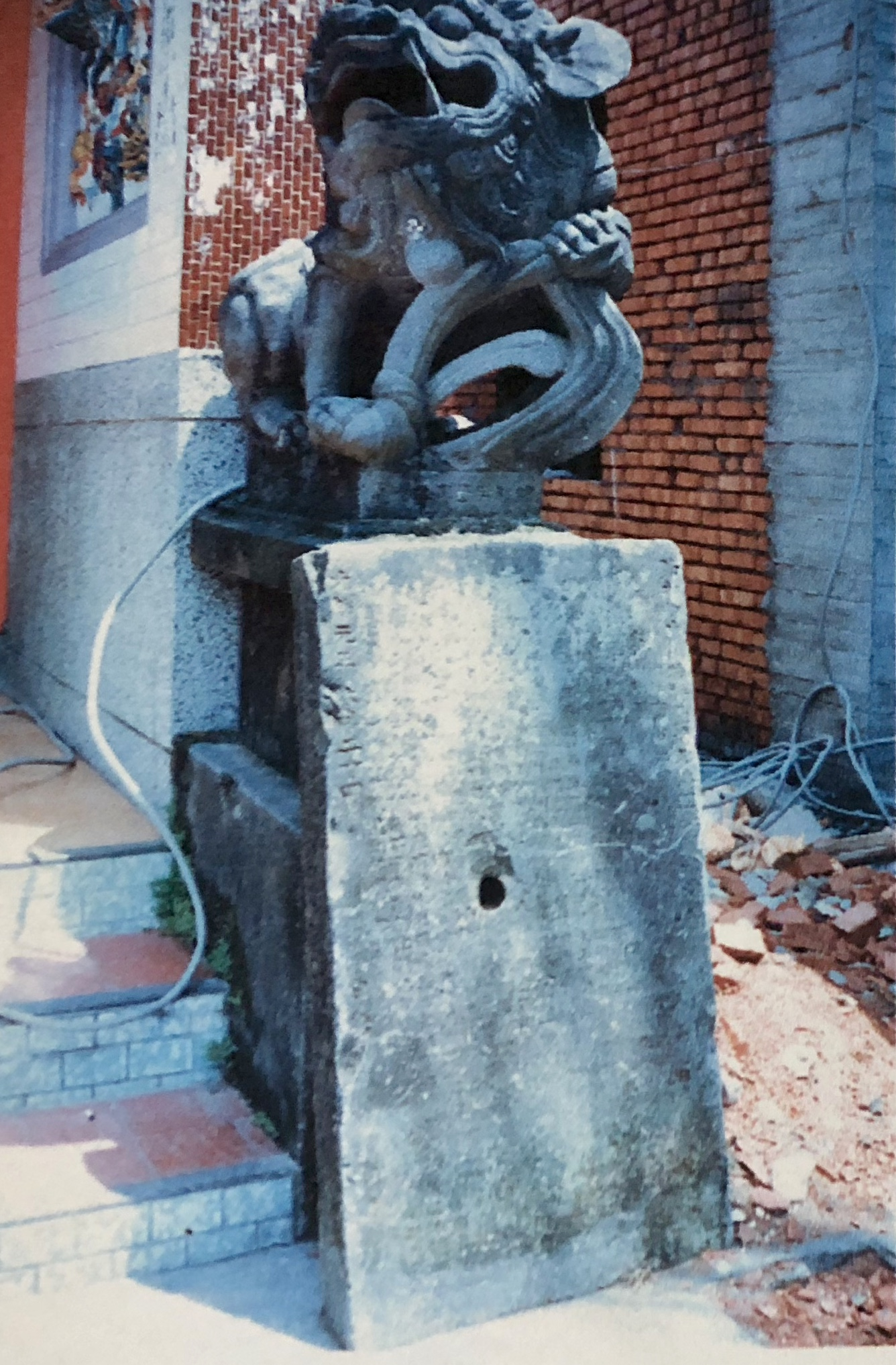 嚴禁水沙連社丁首索詐碑記之古石碑，原位於集集廣盛宮前右側石獅之下，現於廣盛宮的倉庫中收藏